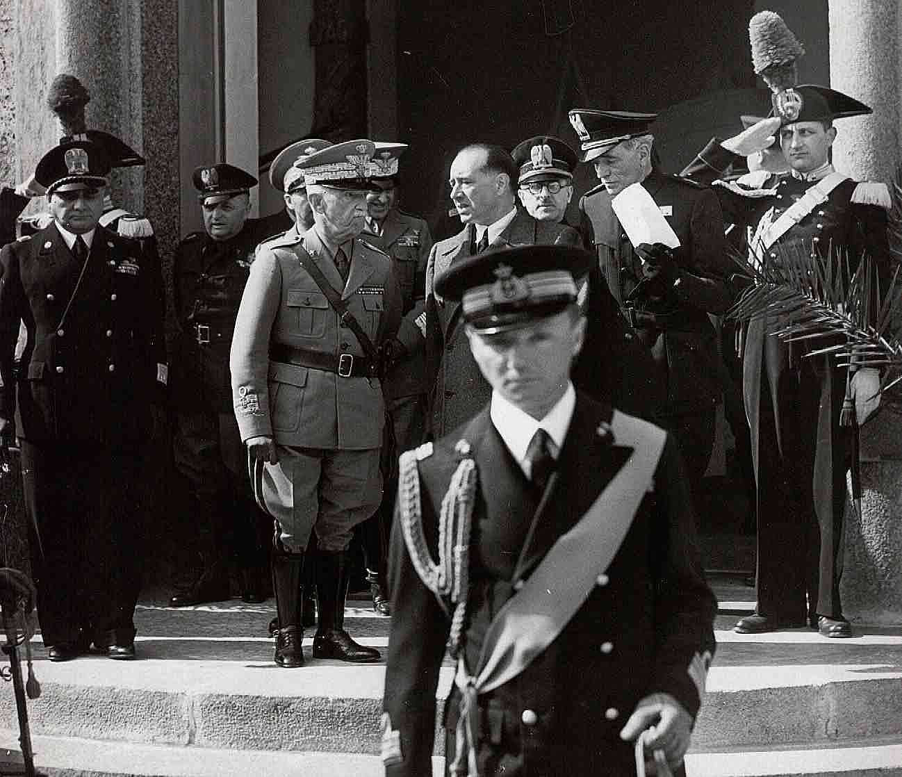 Vittorio Emanuele III con Gianni Caproni durante una visita agli stabilimenti Aeronautici di Predappio